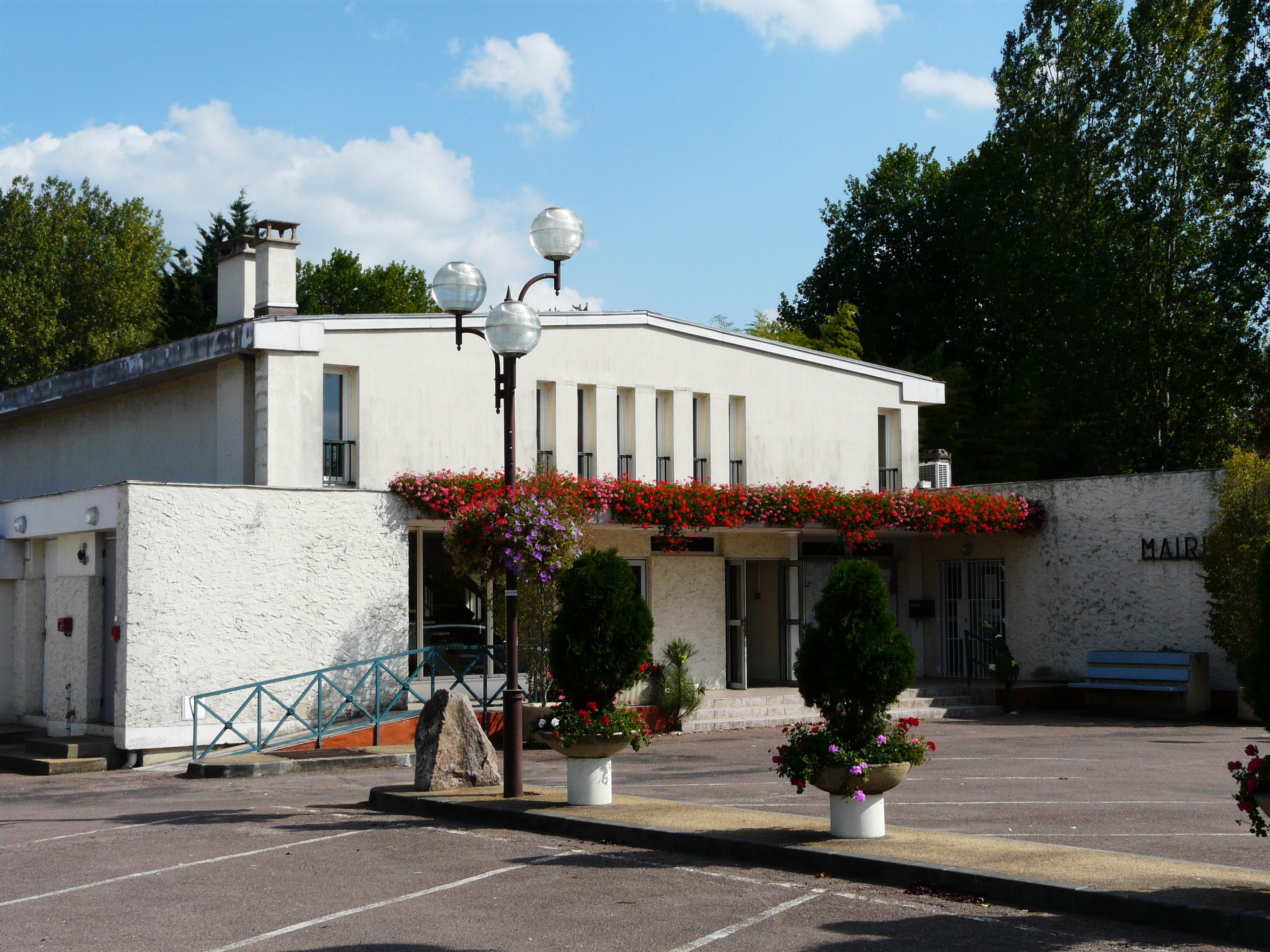 La mairie de Sarliac-sur-l'Isle, Dordogne, France